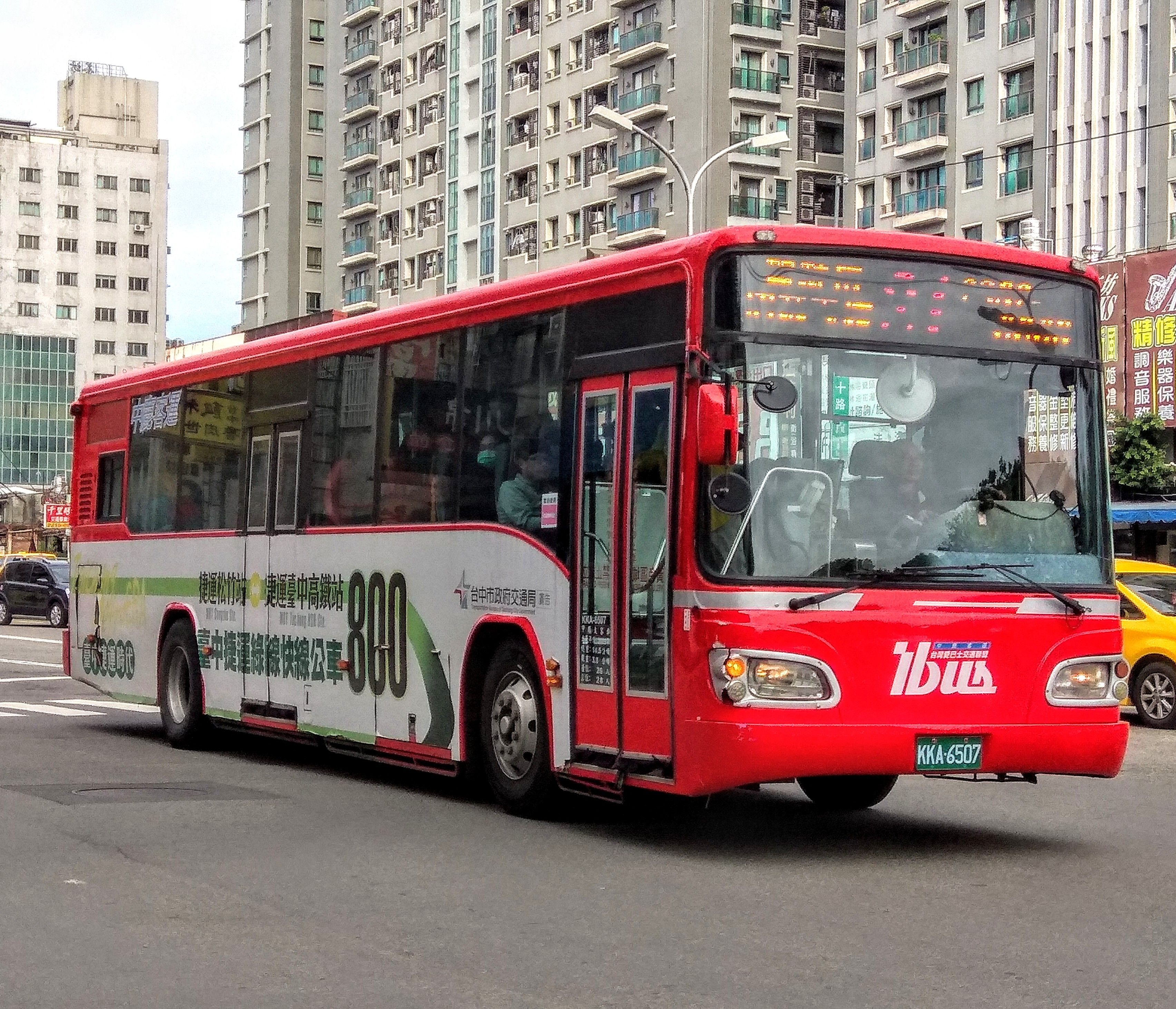 中鹿客運 HINO RK8JRSA大客車 KKA-6507